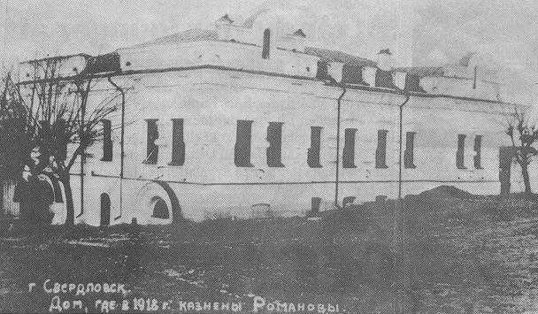 Ipatjev's house in Jekaterinburg